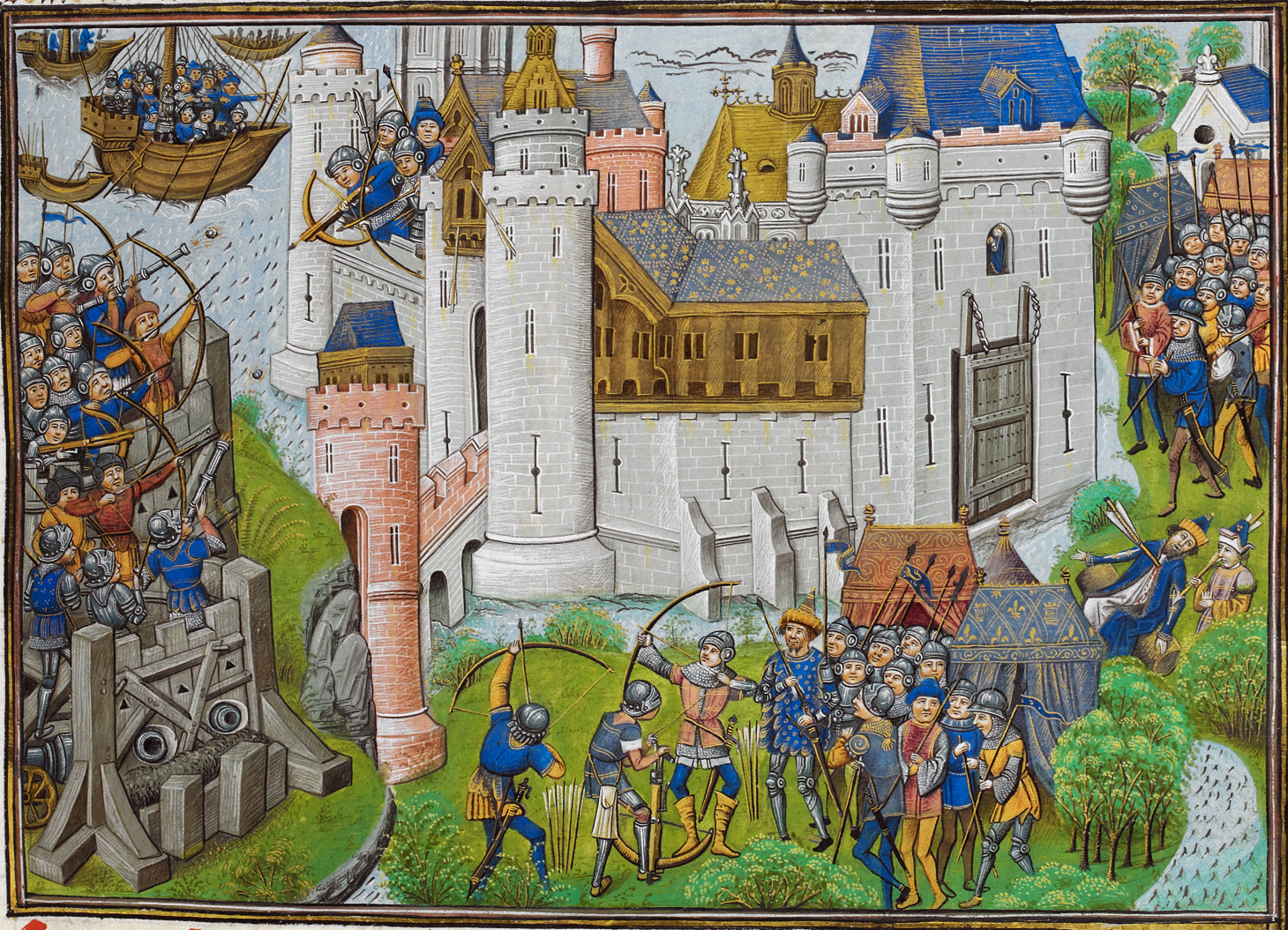 Осада замка Мортань-сюр-Жиронд англичанами в 1377 году. Миниатюра XV века